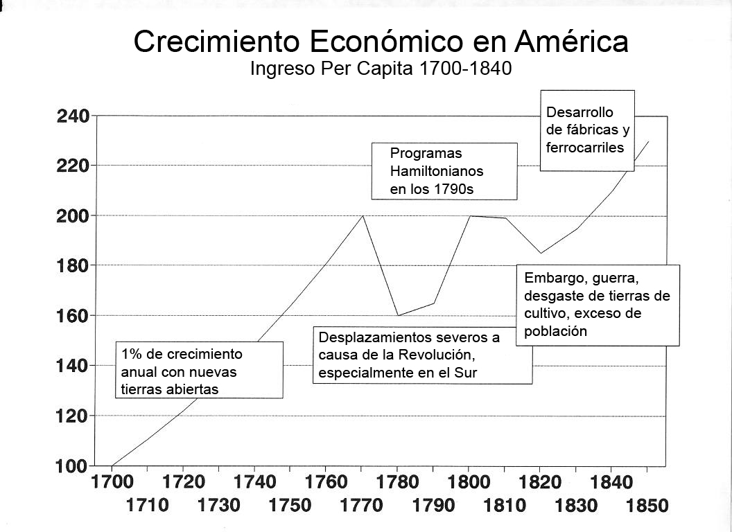 Gráfica que muestra el desarrollo económico de los Estados Unidos de América entre los años 1700 y 1840 y sus principales causas de crecimiento o reducción